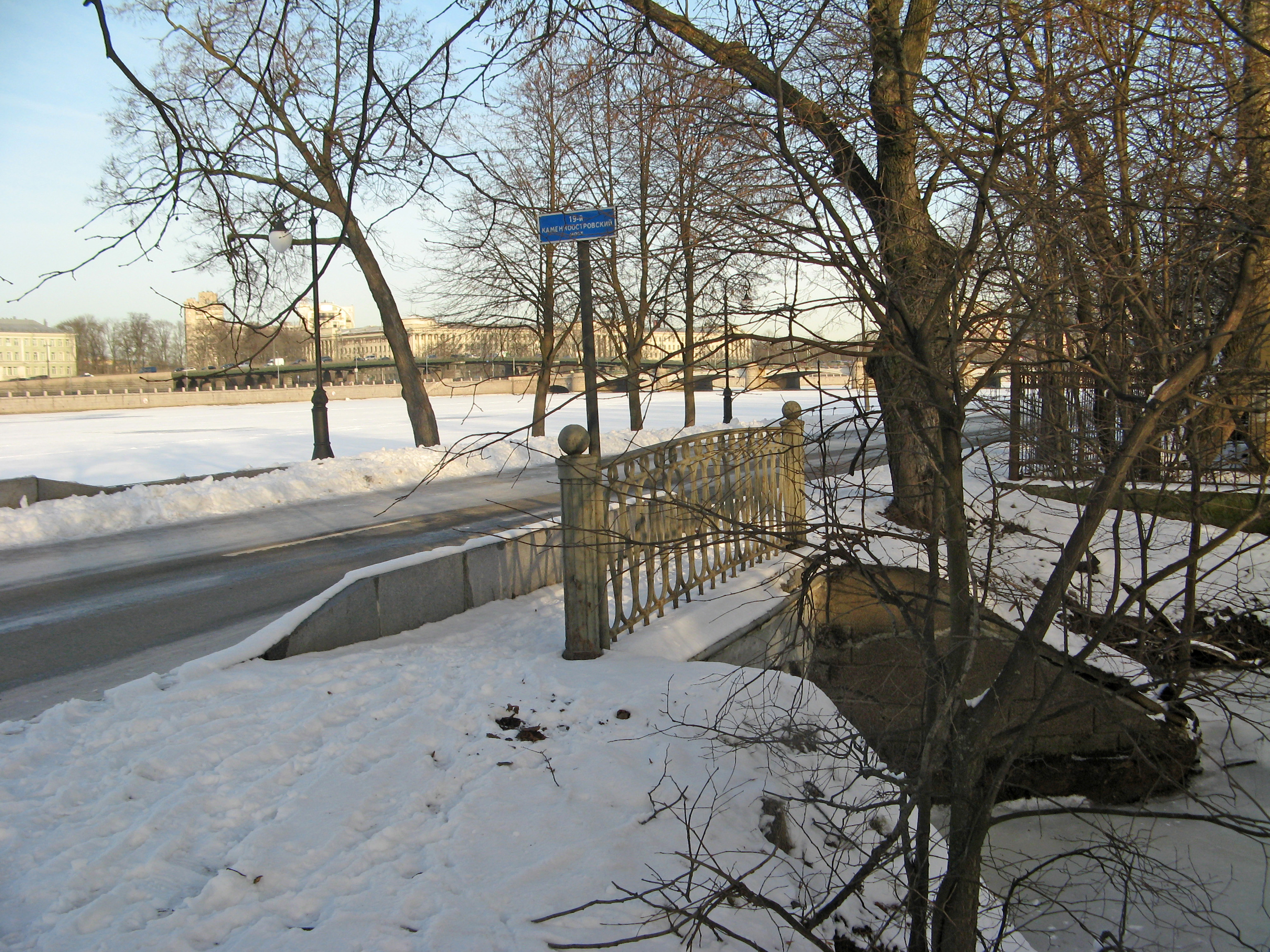 Каменноостровский мост №19: по набережной р. Большой Невки, Петроградский район, Санкт-Петербург